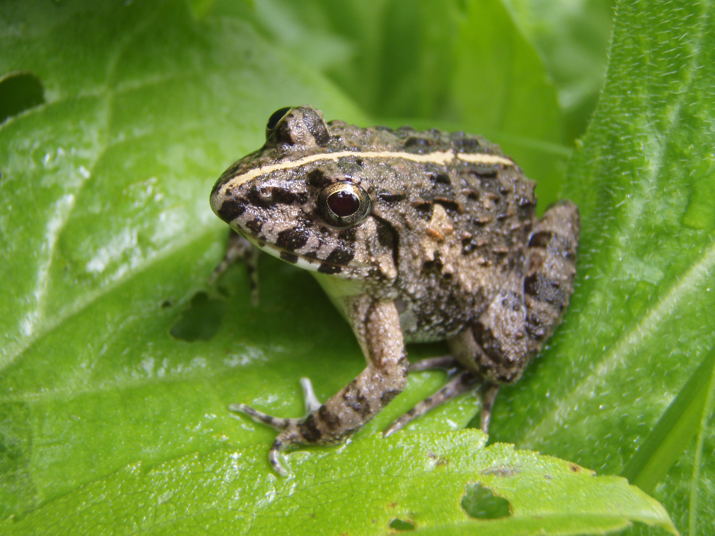 ヌマガエル Fejervarya kawamurai 浮島ヶ原自然公園で撮影